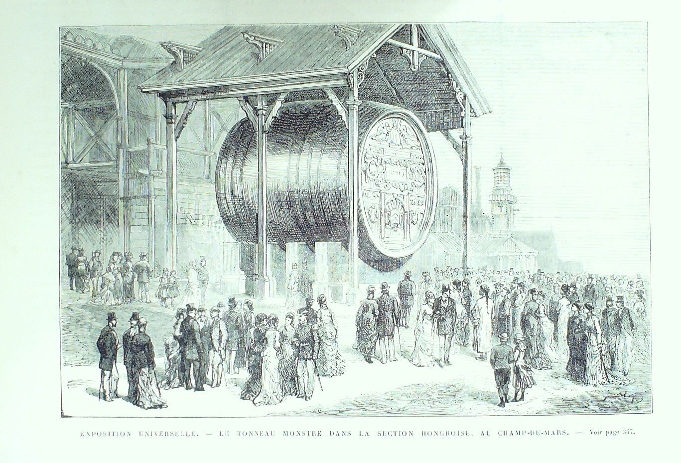 Giant Hungarian barrel at Universal Expo in Paris - Illustration